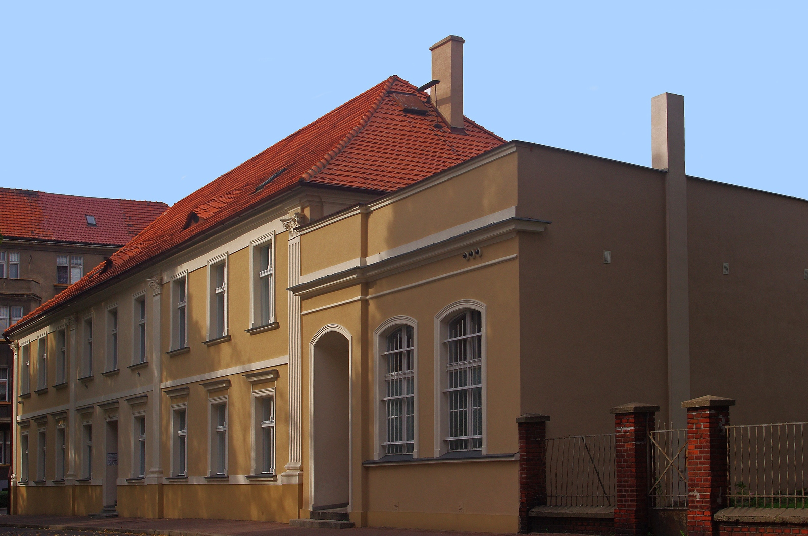 Leszno, ul. Bolesława Chrobrego 32 - dawne gimnazjum braci czeskich, obecnie archiwum z końca XVIII w. (zabytek nr 638/Wlkp/A)